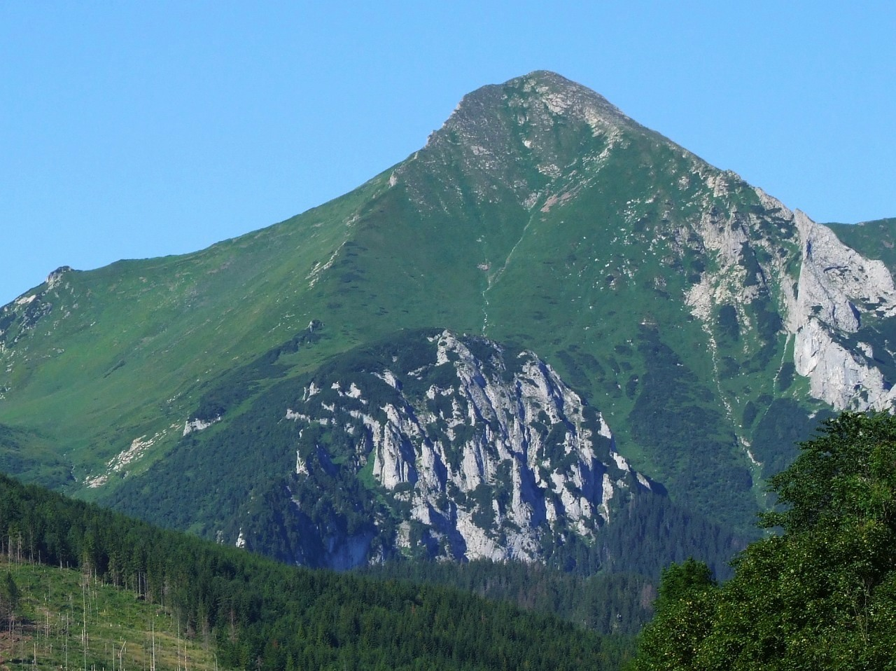 Płaczliwa Skała, pod nią Głośna Skała, widok z Doliny Bielskiego Potoku